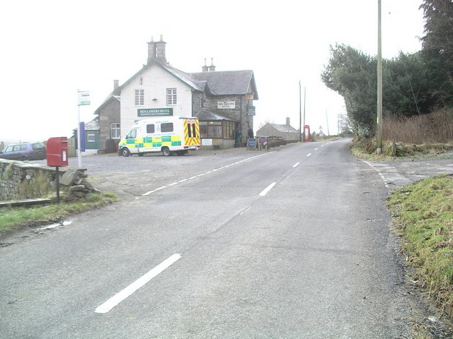 Ben Lawers Hotel, Lawers